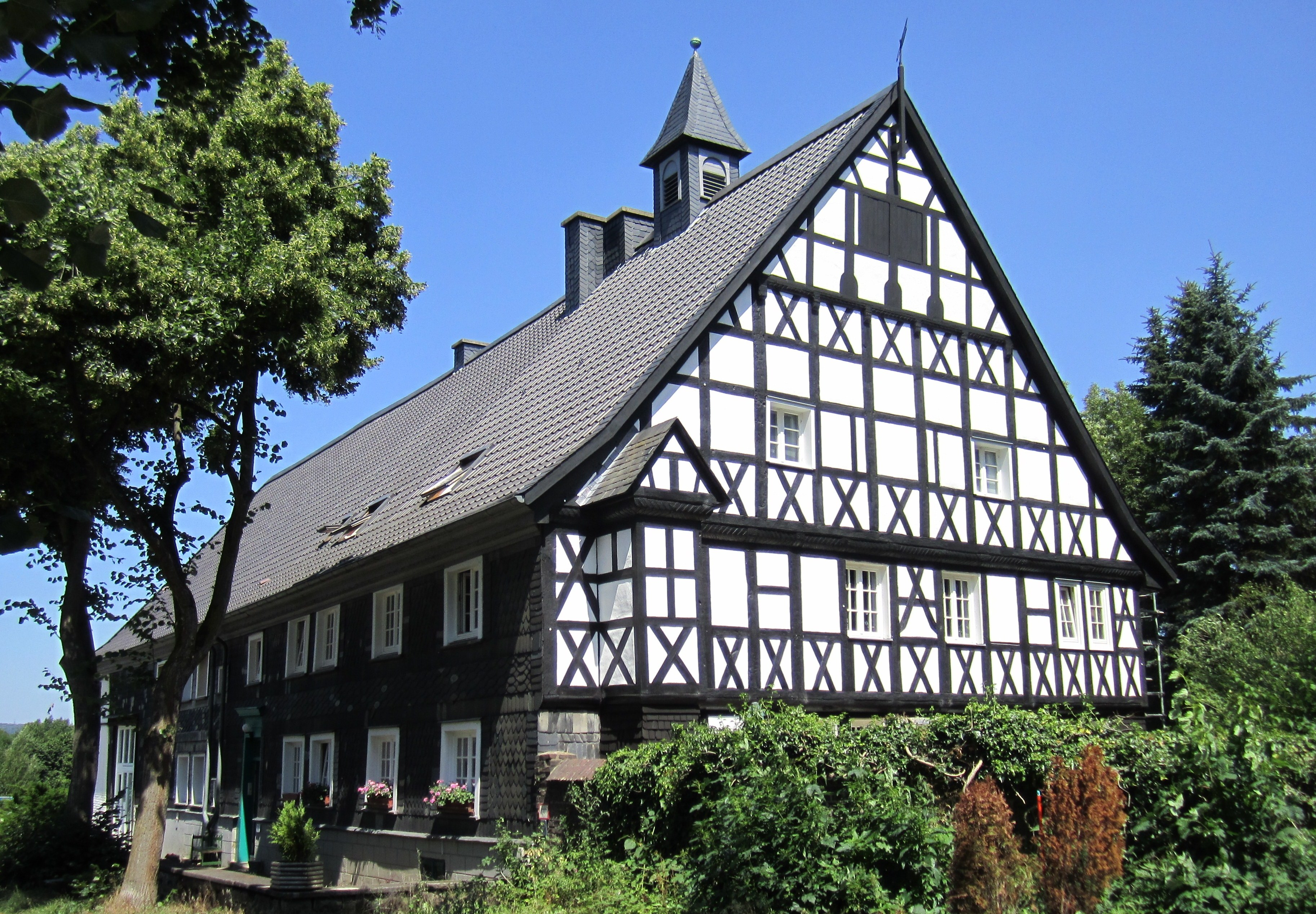 Denkmalgeschütztes Gut Funckenhausen in Hagen-Vorhalle, Funckenhausen 1. Erbaut im Stil der niedersächsischen Hallenhäuser mit einem der schönsten Renaissance-Fachwerkgiebel im heimischen Raum. Türbalken-Inschrift: „ANNO 1713 DEN 18 MAY“. Im Inneren eine zentrale hohe Wohnhalle mit Kamin und Barocktreppe. Das ursprünglich abgebrandte „Gut Sporbeck“ kam 1421 in den Besitz der historisch wichtigen Hagener Familie Funcke und ist seitdem nach ihr benannt. Nach dem Brand wurde das Hauptgebäude 1713 neu errichtet. Im hinteren restaurierten ehemaligen Scheunenteil und in einem Neubau befindet sich eine Kindertagesstätte. Außerdem ist ein umgesetzter und restaurierter Hafer-/Kornkasten vorhanden. Inschrift: „ANNO 1665 DEN 10 JULY“. This is a photograph of an architectural monument.